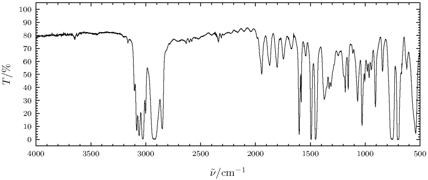 Transmissions-Infrarotspektrum einer Polystyrol-Folie.